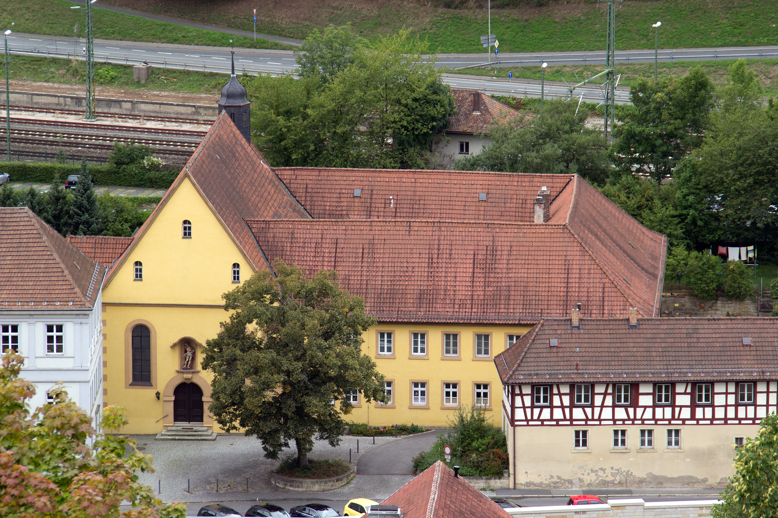 Oblatenkloster und Klosterkirche St. Petrus von Alcantara in der Klosterstraße in Kronach.